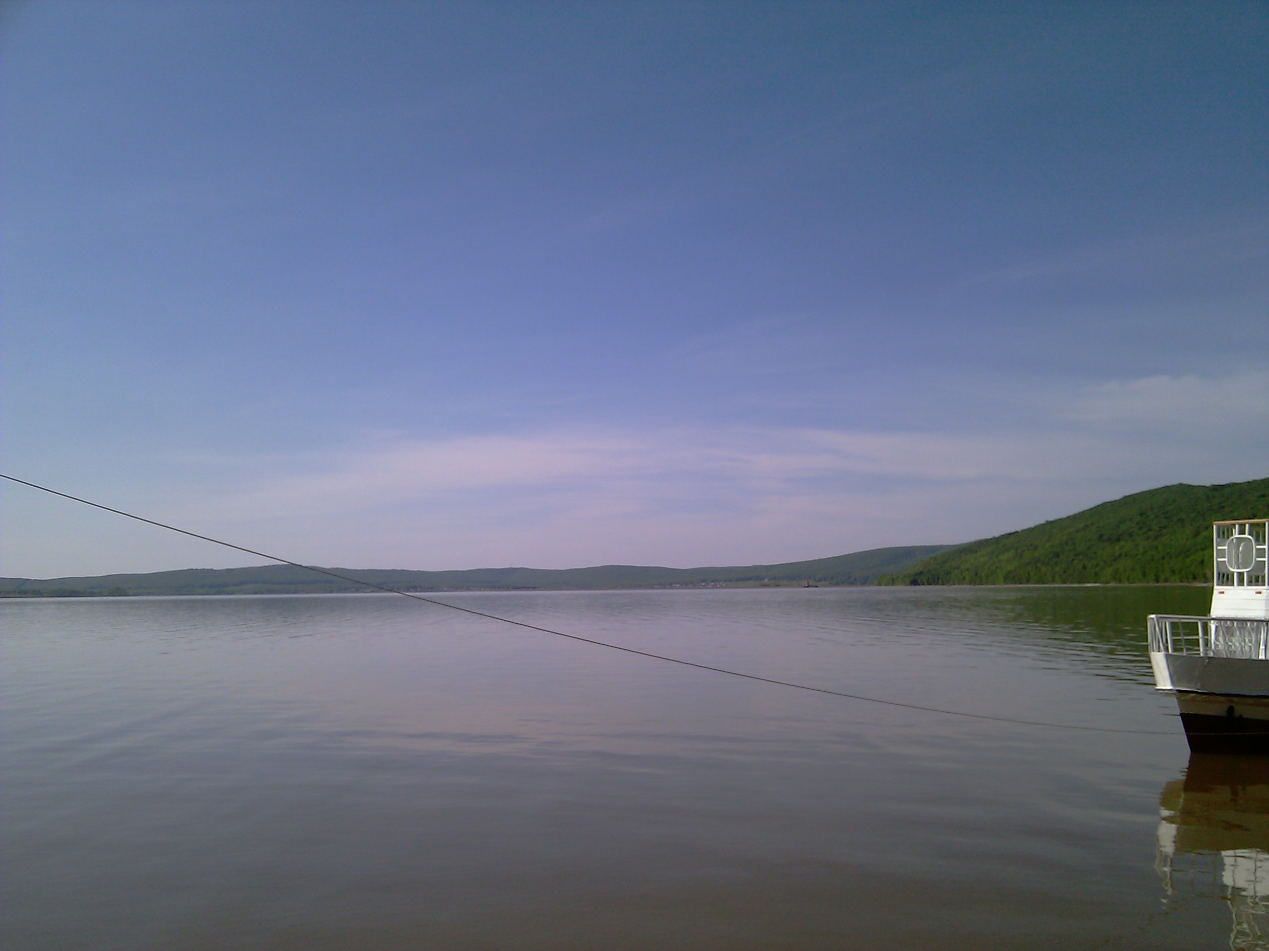 Нугуш, "Лесная Сказка" 2010-05-15